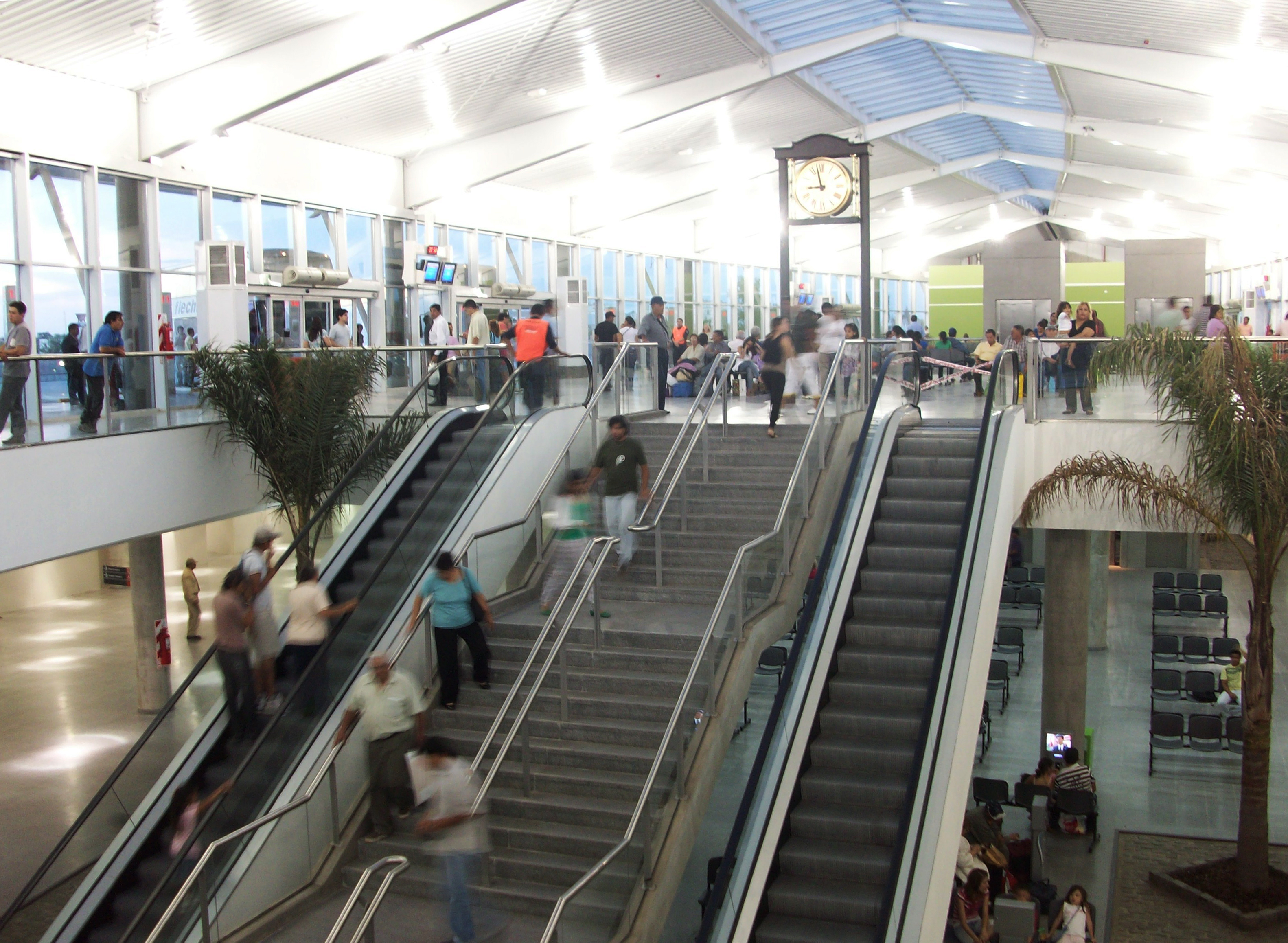 Pre-embarque de la terminal de ómnibus de Santiago del Estero al atardecer